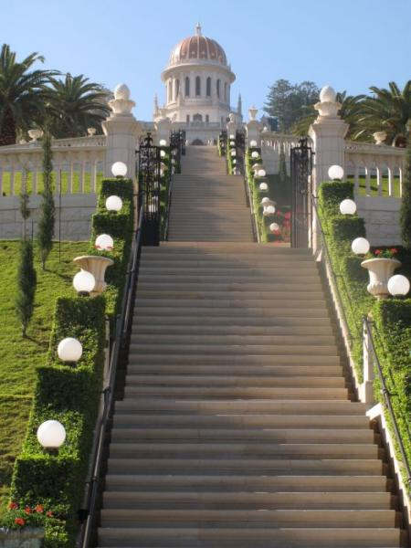 מקדש הבהאים והגנים התלויים על הר הכרמל